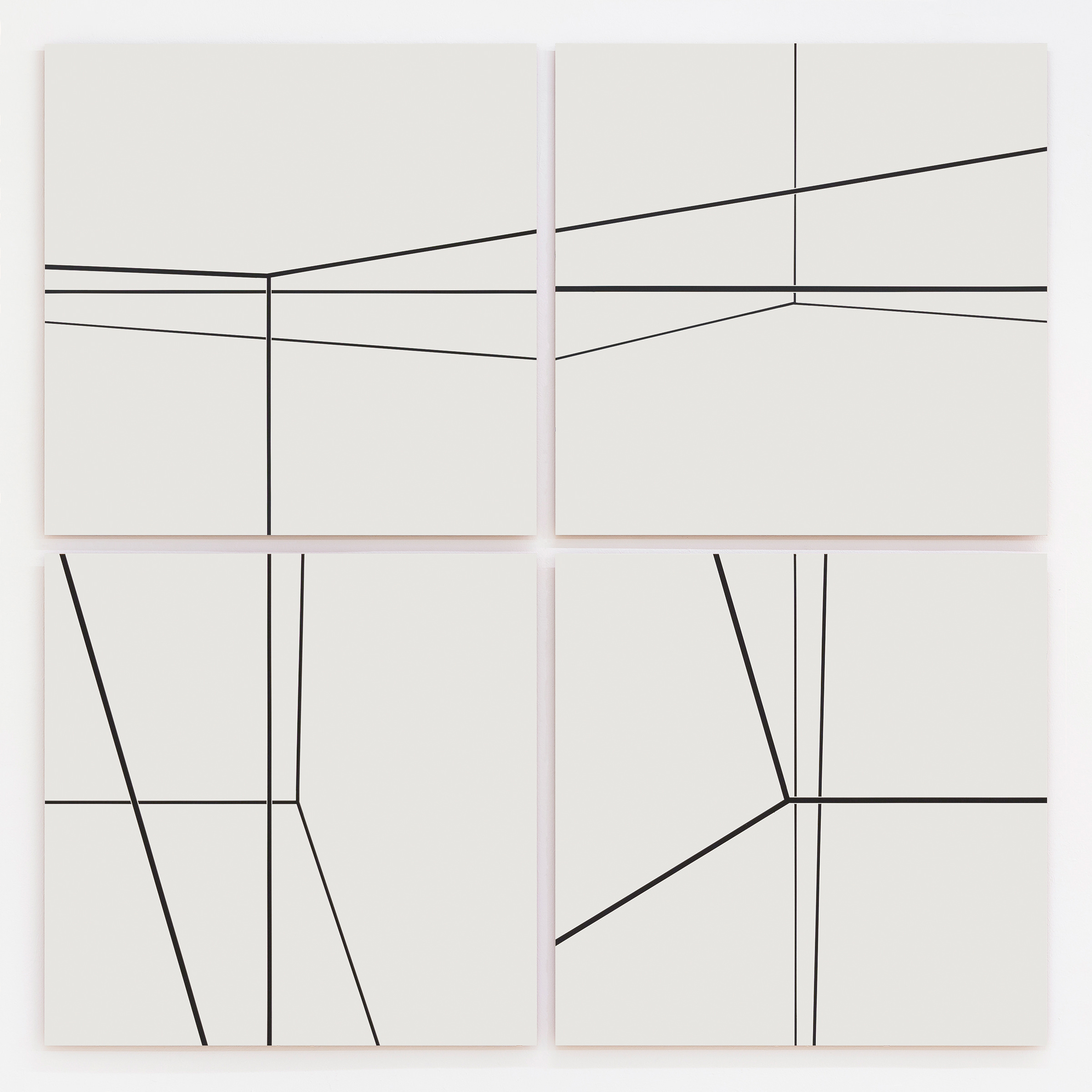 Eine vierteilige Wandarbeit der österreichischen Malerin Barbara Höller von 2015, die sich mit der räumlichen Darstellung eines Raumes befasst und mehrere Kombinationsmöglichkeiten der Hängung ermöglicht.